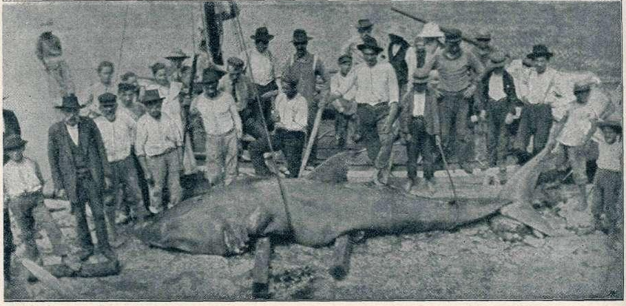 Orjaški som na reki.